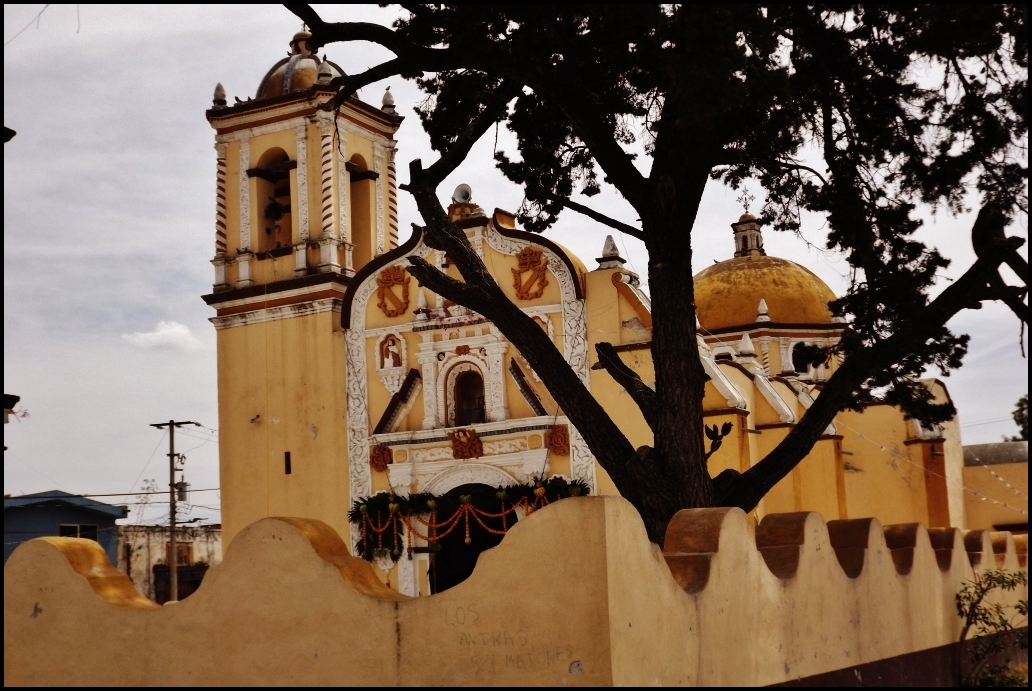 Templo San Diego Quecholac,Barrio San Diego,Quecholac,Estado de Puebla,México